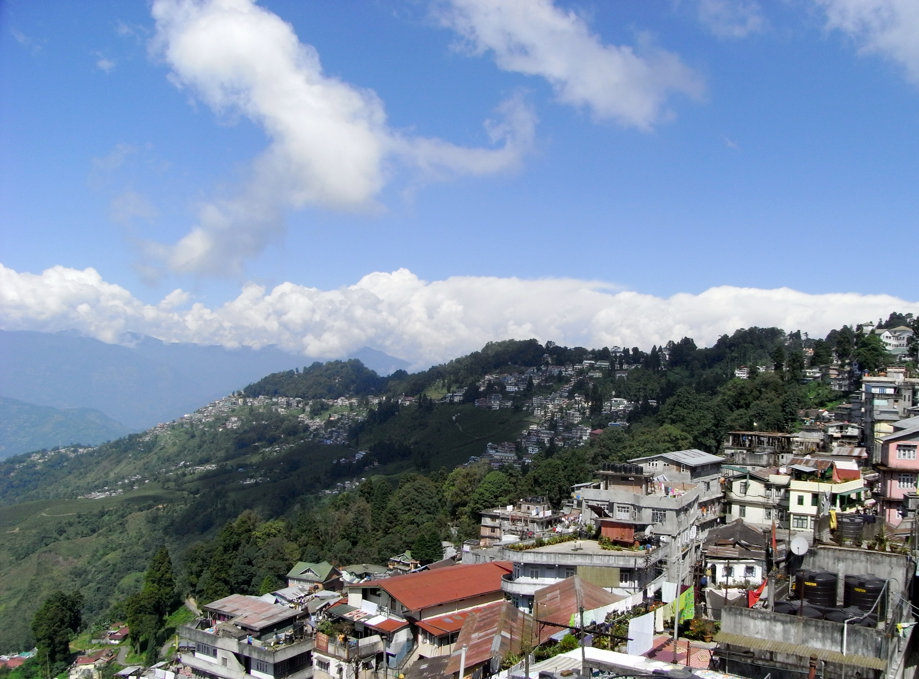 Darjeeling view, 2008.